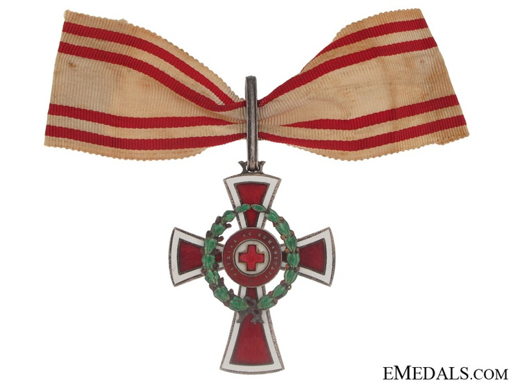 Vöröszkereszt Díszjelvényének I. osztálya hadidíszítménnyel